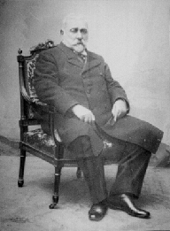 Ramón Santamarina